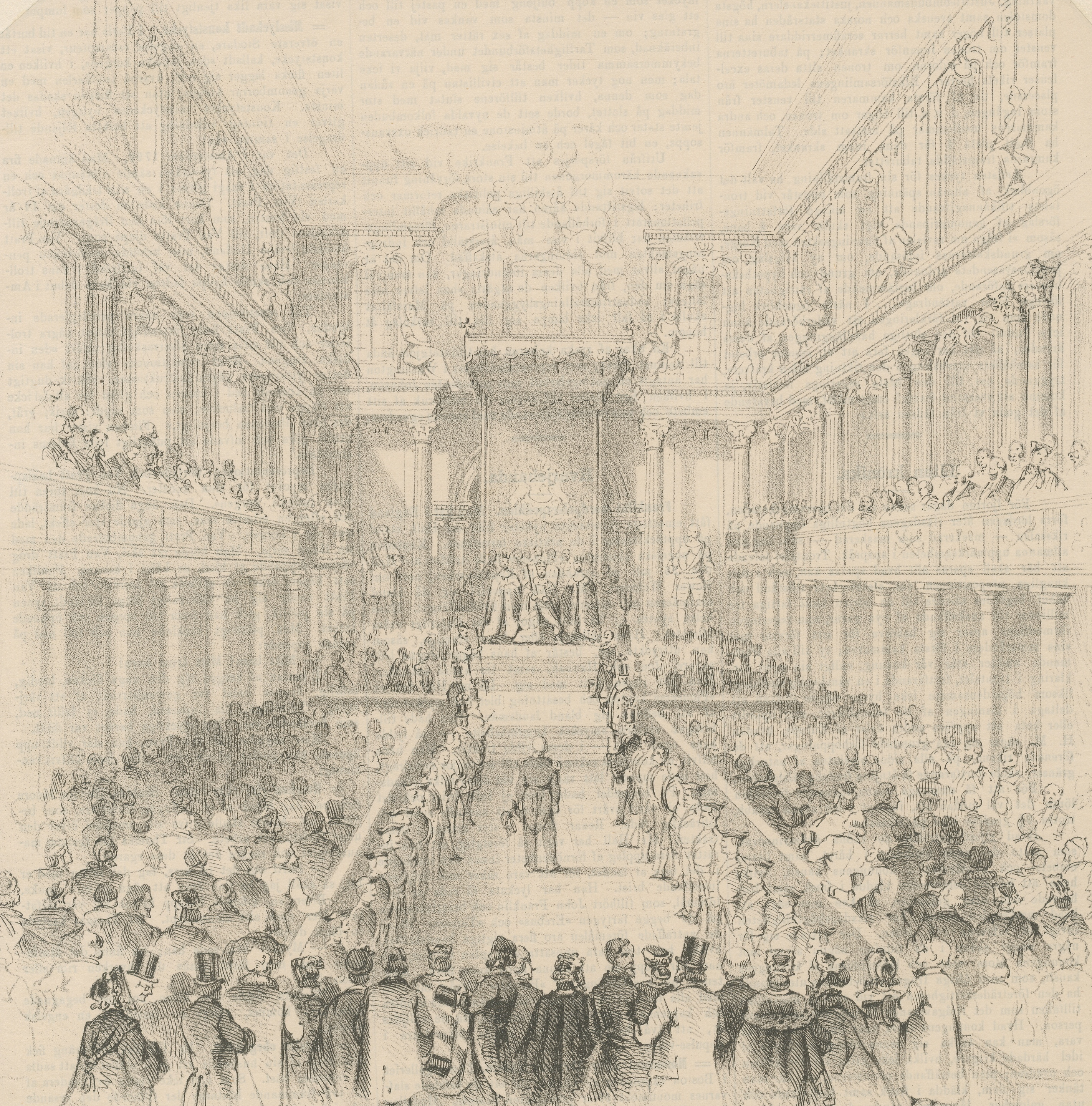 Karl XV öppnar den första tvåkammarriksdagen den 19 januari 1867 i Rikssalen på Stockholm slott.